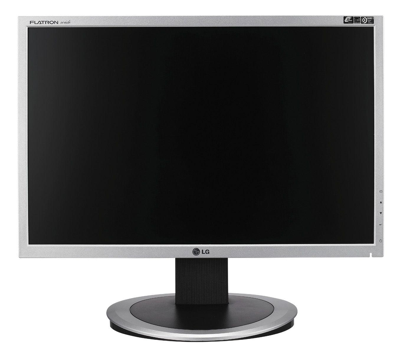 LG L194WT-SF LCD monitor